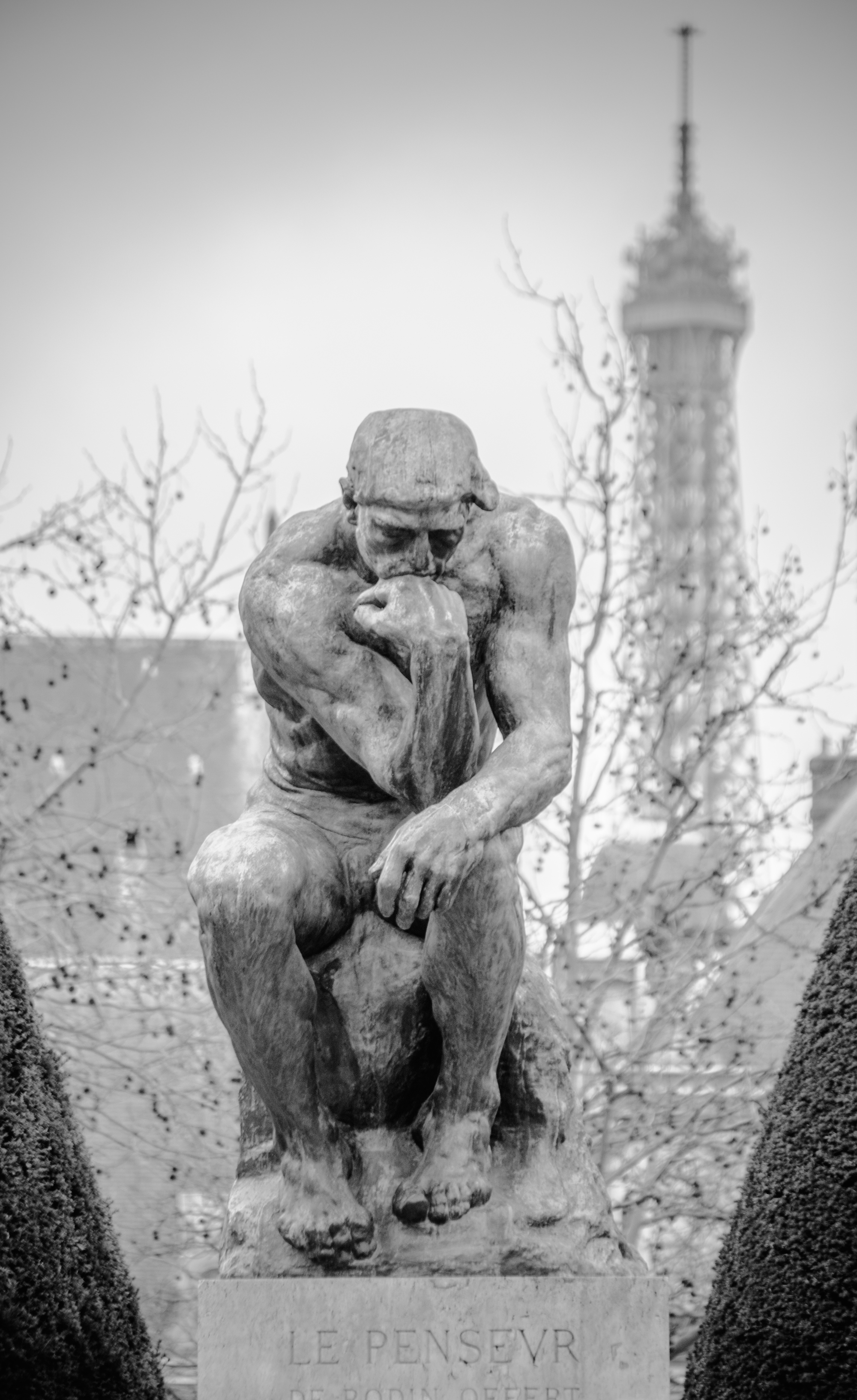 Hôtel de Biron (actuel musée Rodin)